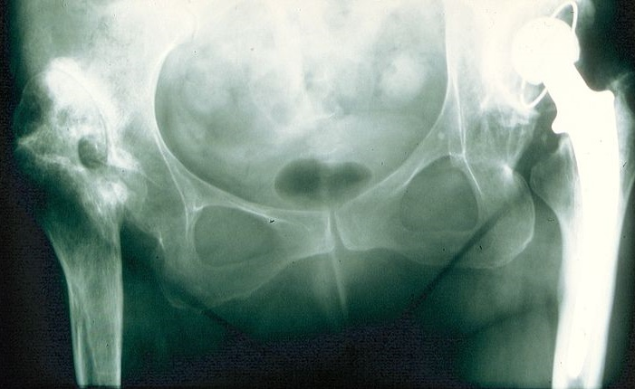 Beckenübersicht bei einer 57-jährigen Patientin: Alte Abduktionsosteotomie des oberen Femurendes rechts, wahrscheinlich wegen Coxa vara, Hochstand des verkürzten Femurhalses am Darmbein. Links analoge Situation mit schlecht implantierter zementierter Hüftendoprothese, Pfanne oberhalb vom (unbenutzten) Acetabulum.